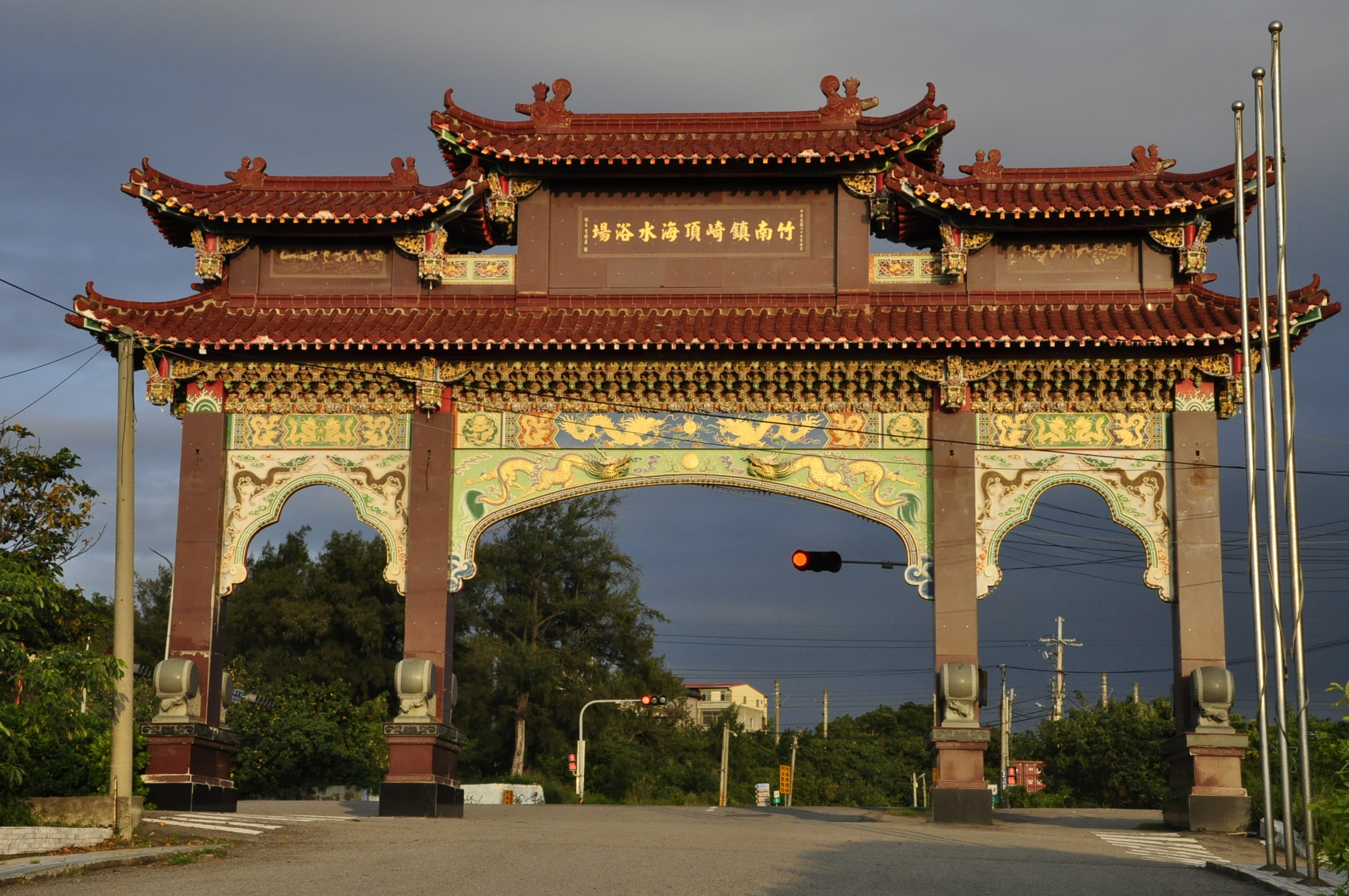 中文（台灣）: 苗栗縣竹南鎮崎頂海水浴場入口牌樓。